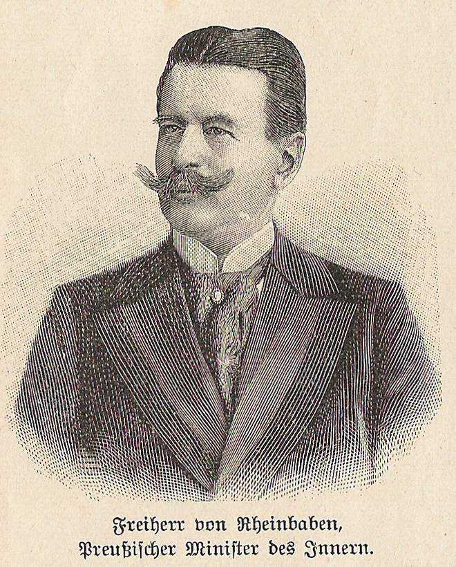 Porträt Georg von Rheinbaben